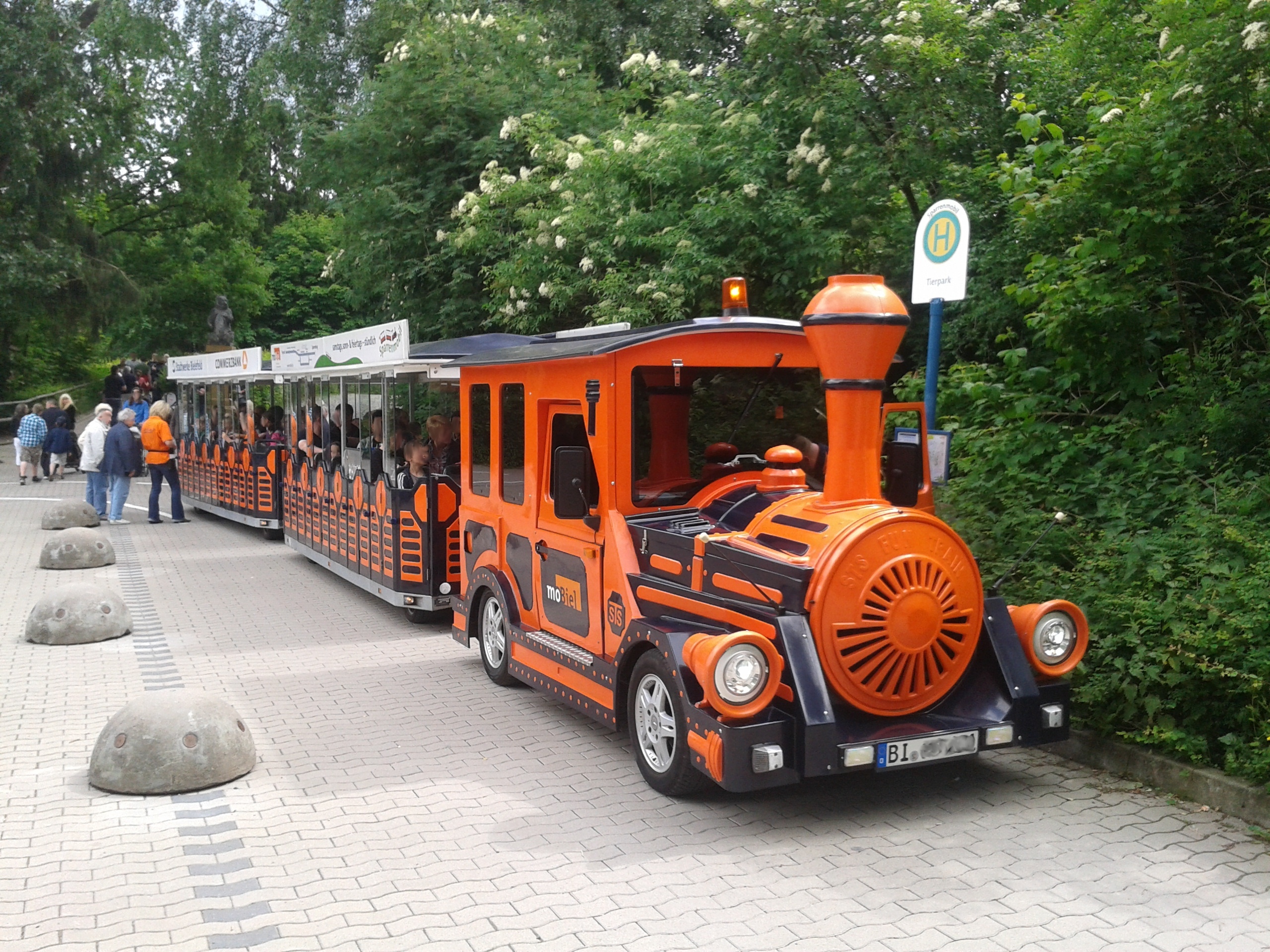 Sparrenmobil am Tierpark Olderdissen Bielefeld.